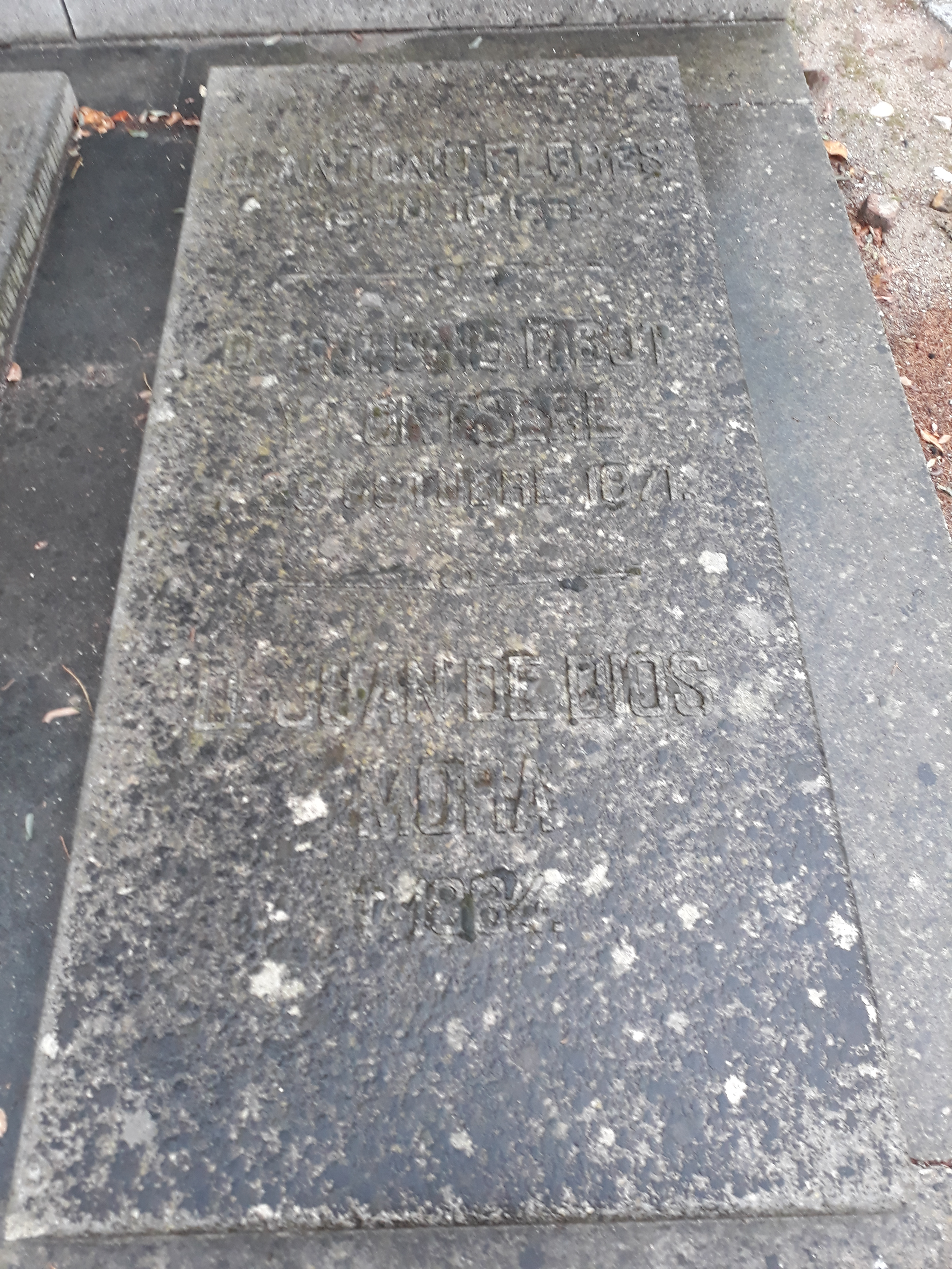 Grabplatte der Umbettungen von aufgelassenen Friedhöfen auf dem Almudena-Friedhof in Madrid (III): Antonio Flores Algovia, Antonio Ribot y Fontseré,Juan de Dios Mora.